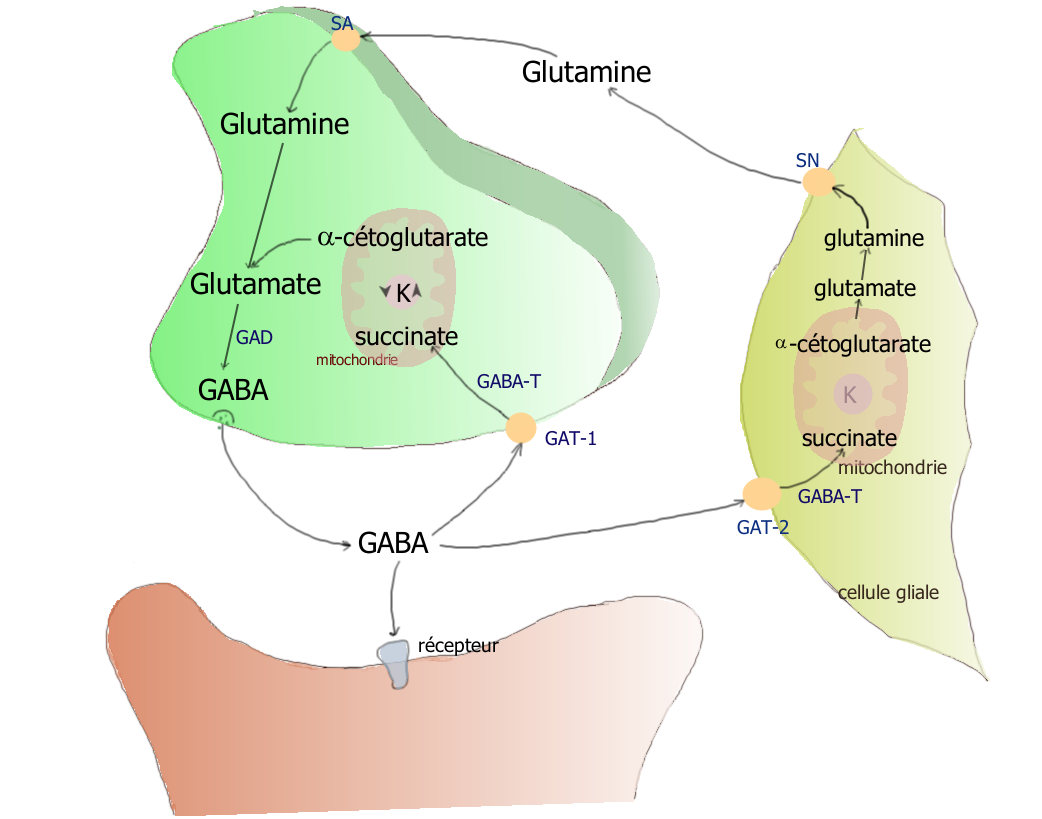 métabolisme du GABA, participation des cellules gliales